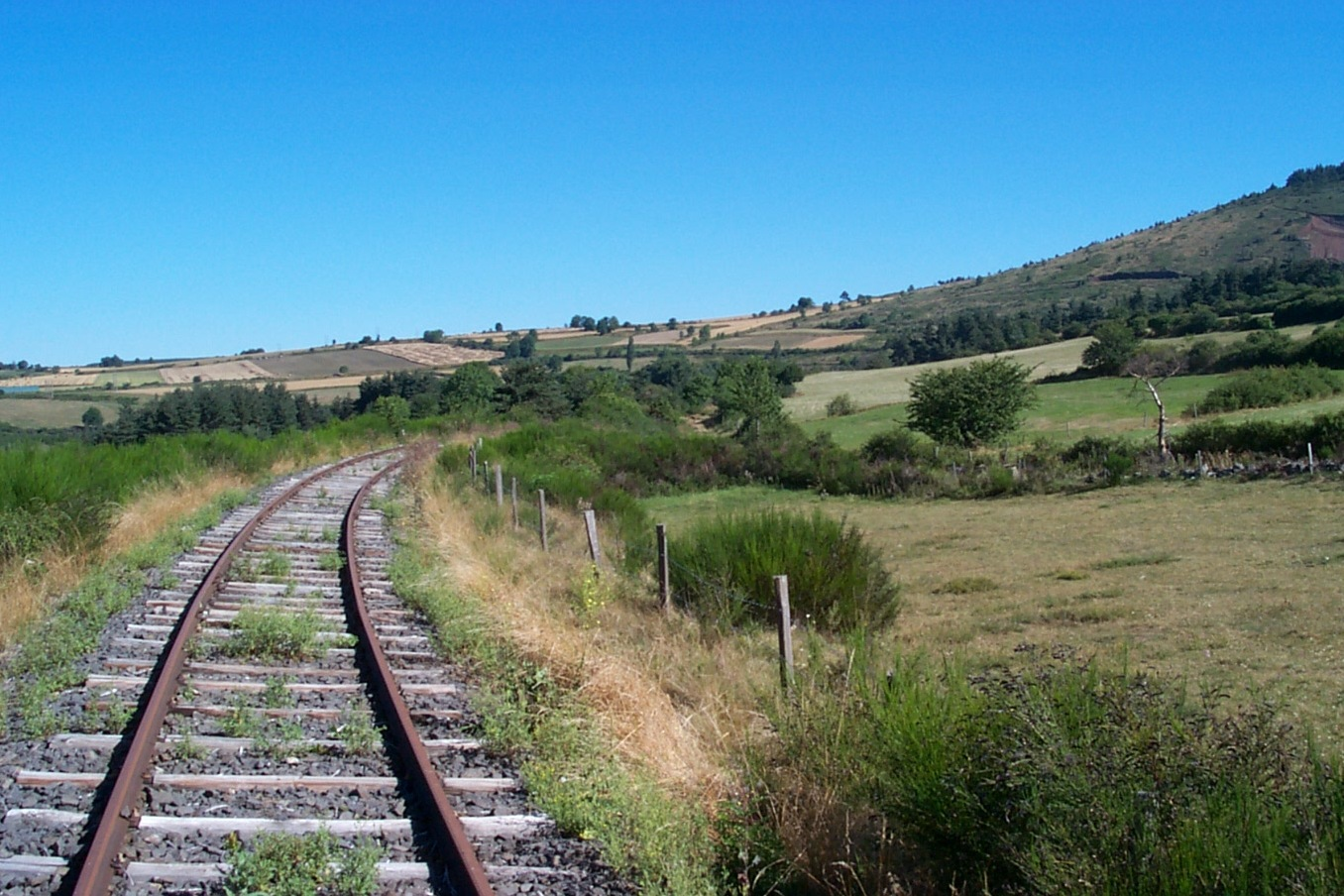 Vélo rail de Pradelles en 2002 (Pradelles, Haute-Loire, France)